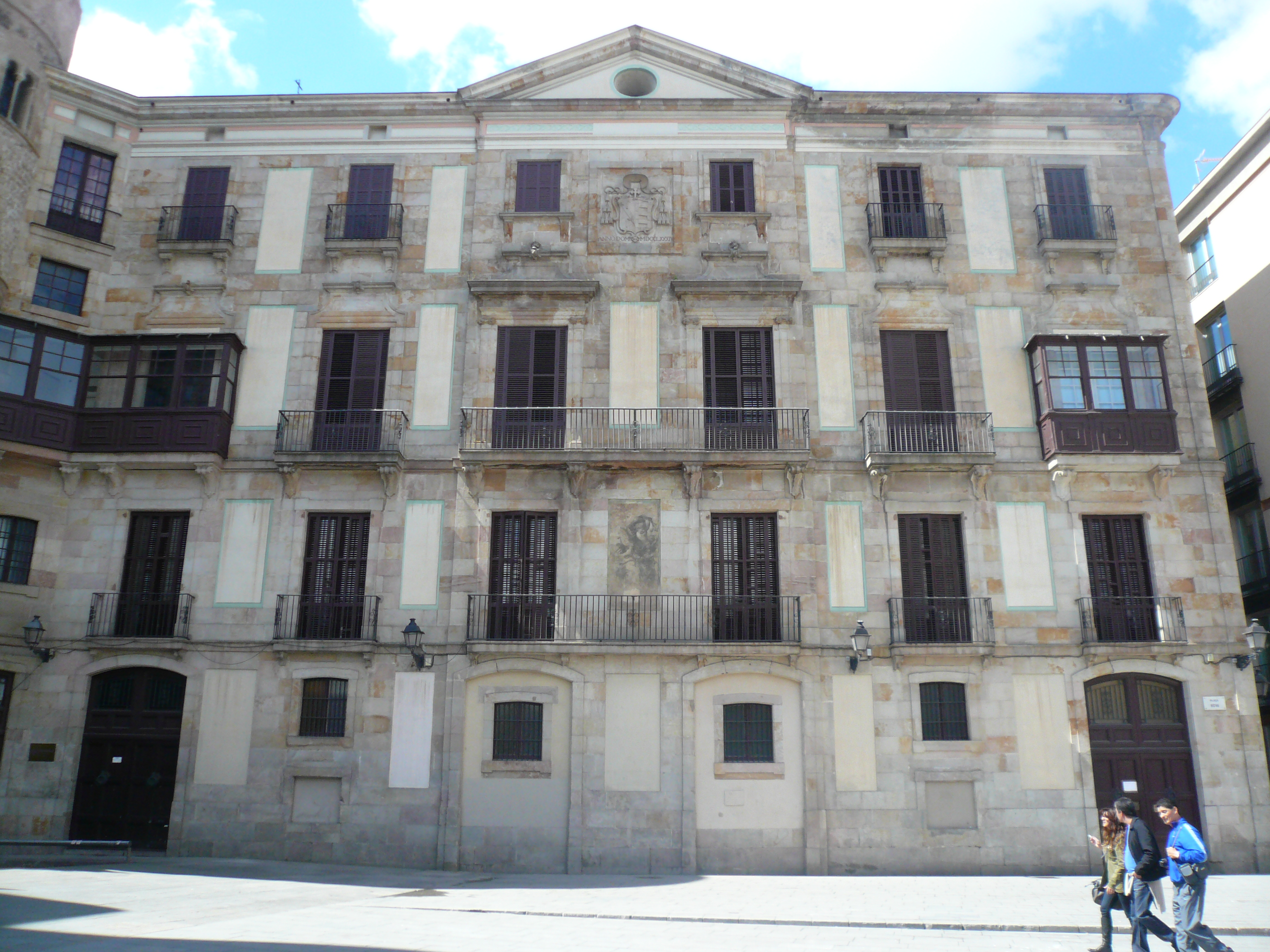 Palau del Bisbe. C/ Bisbe, 5 - pl. Nova, 1-2 - c/ Palla, 18 (Barcelona). Object location41° 23′ 01.68″ N, 2° 10′ 32.46″ E